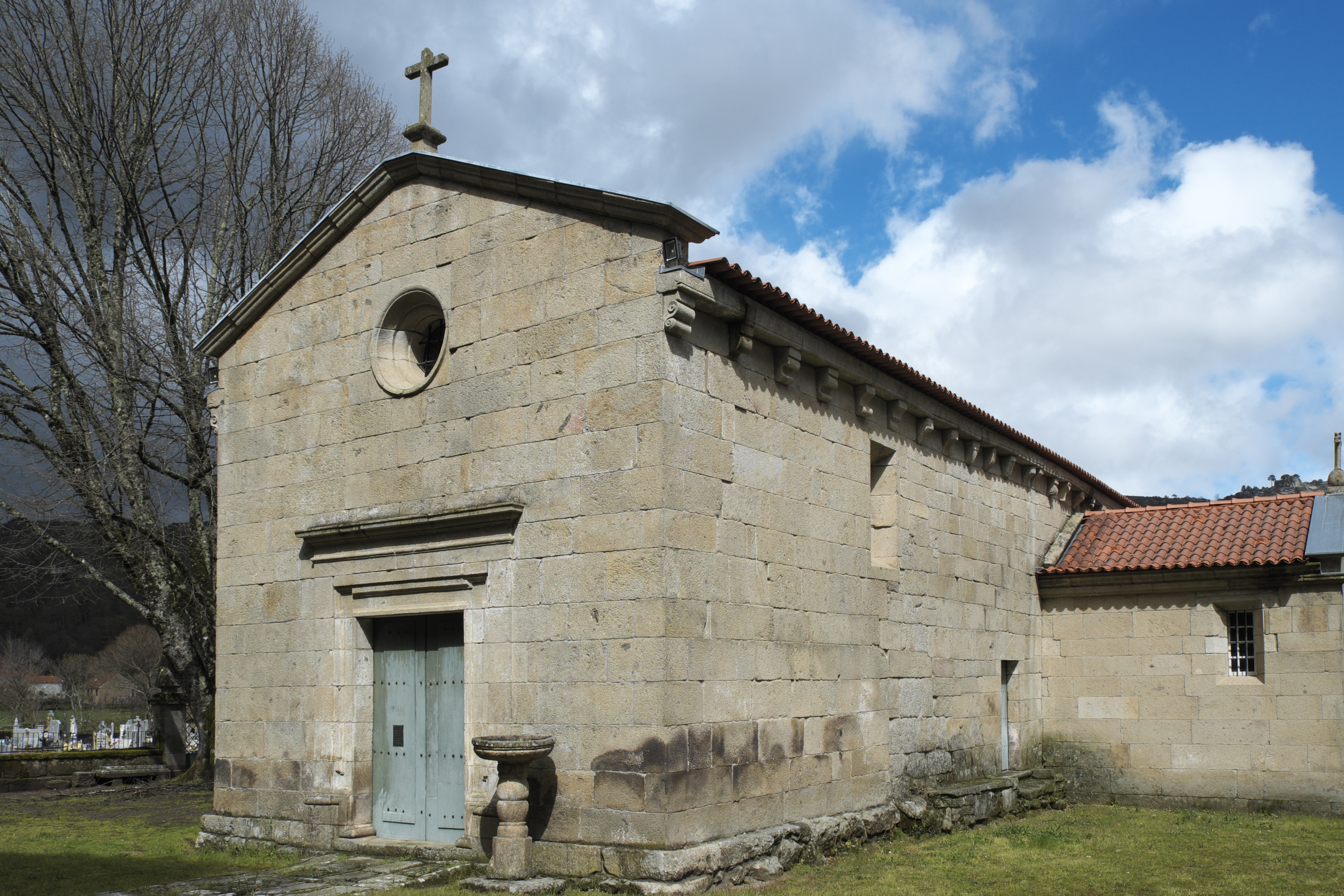 Romanische Pfarrkirche Santa Maria in Covas do Barroso, einer Freguesia von Boticas in der Região Norte (Portugal)